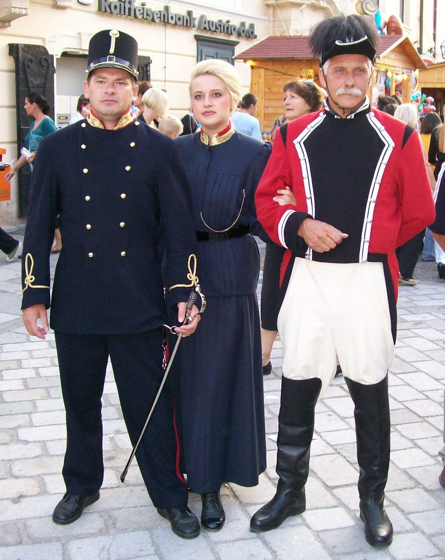 Špancirfest 2008., Varaždin